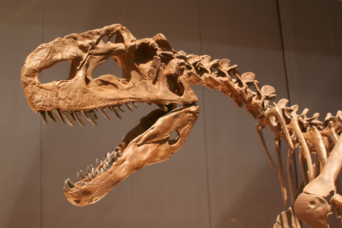 Monolophosaurus - 03